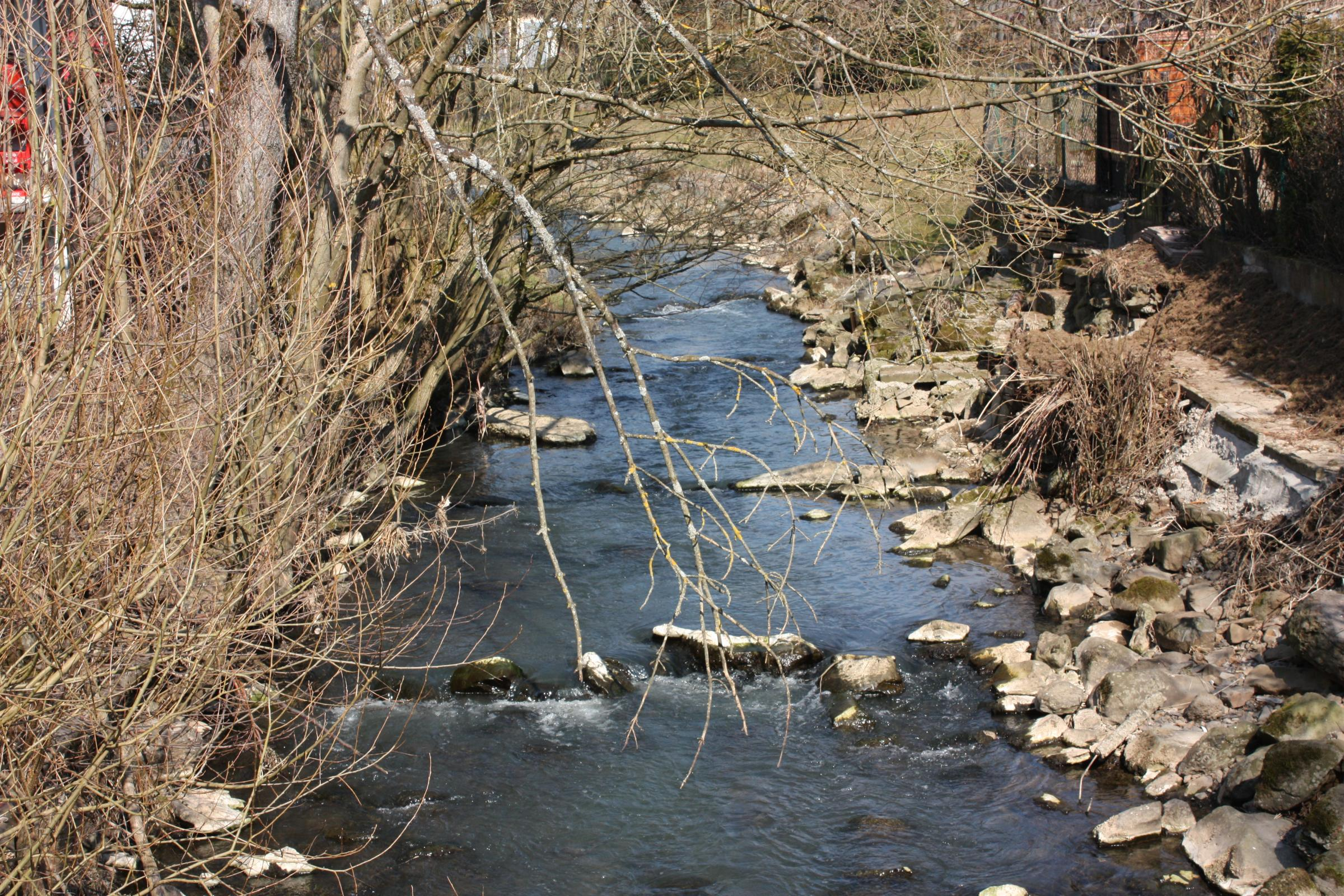 Lasterbach in Hausen, Westerwald (Waldbrunn), Hessen, Deutschland